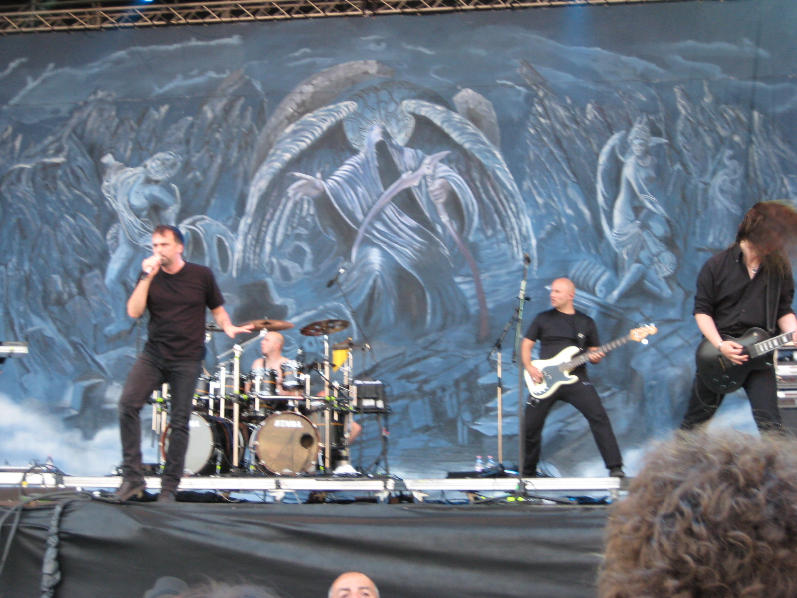 i blind guardian al gods of metal 2009 monza